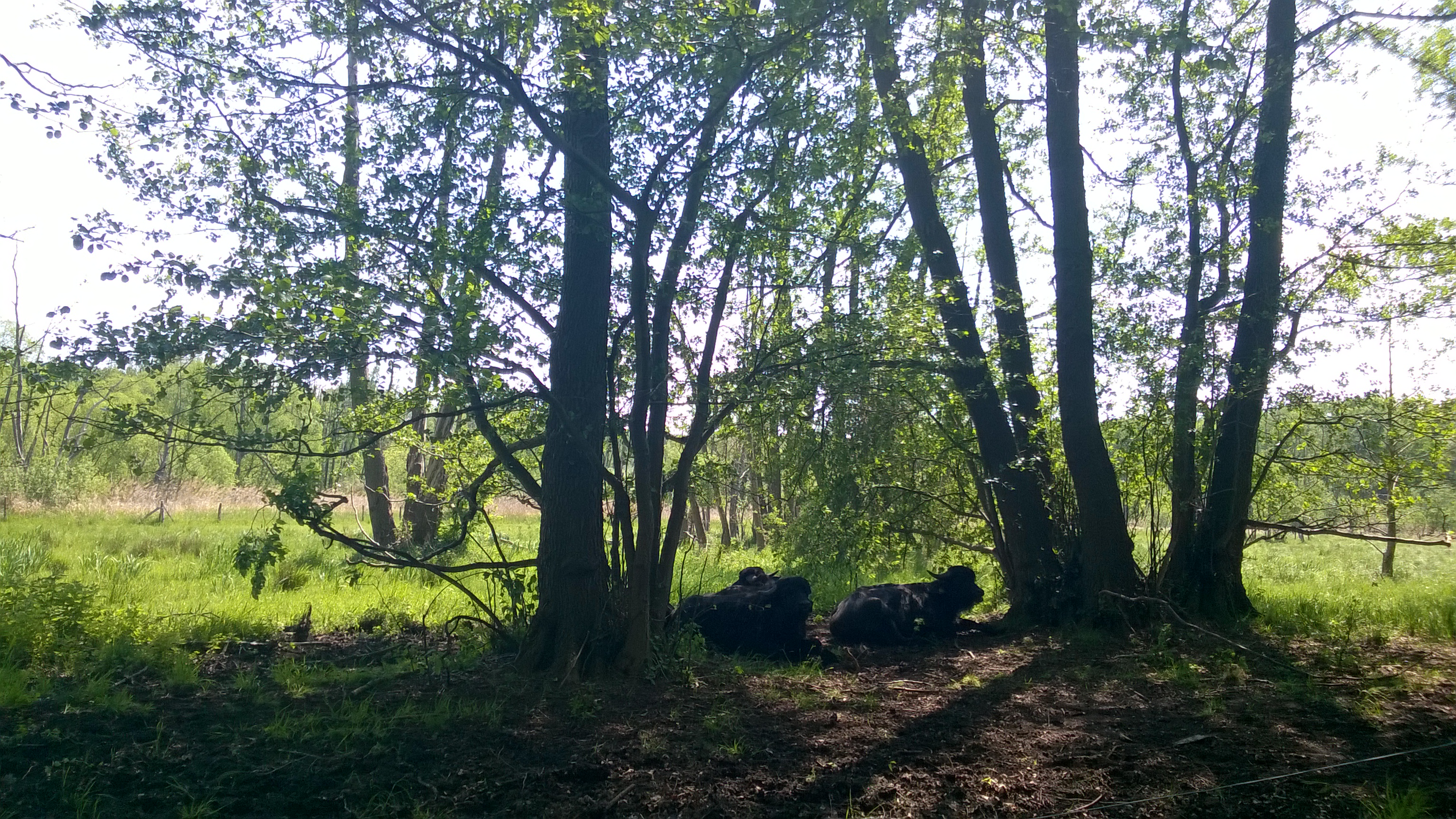 Wasserbüffel im Tegeler Fließ in Waidmannslust, aufgenommen beim Naturtag der Freien Alternativschule Berlin